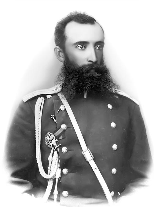 Известный русский военный и путешественник Михаил Ефимович Грум-Гржимайло (1861—1921)